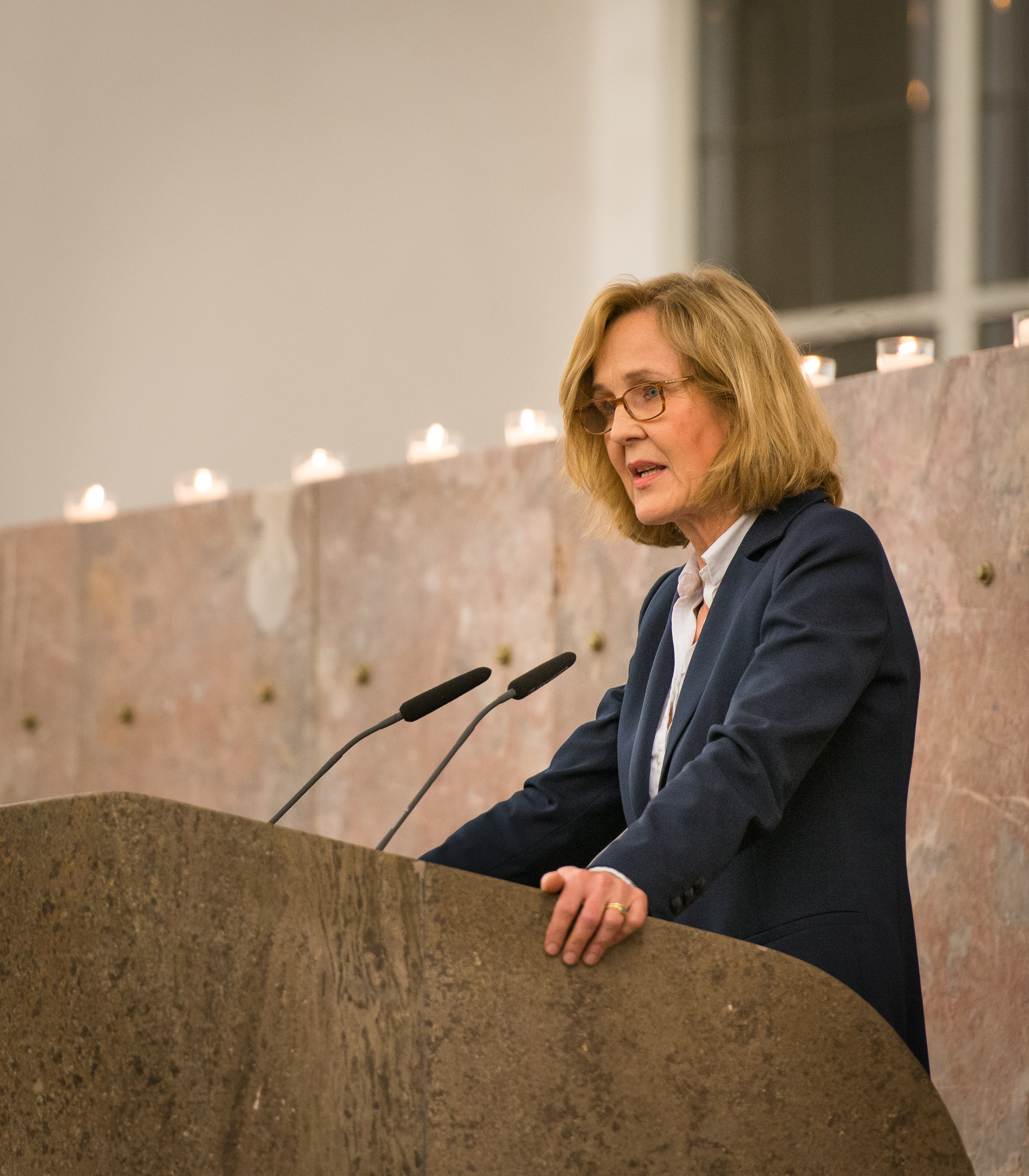 Margarete von Galen auf dem Welt-AIDS-Tag in der Paulskirche in Frankfurt am Main (Dezember 2014)